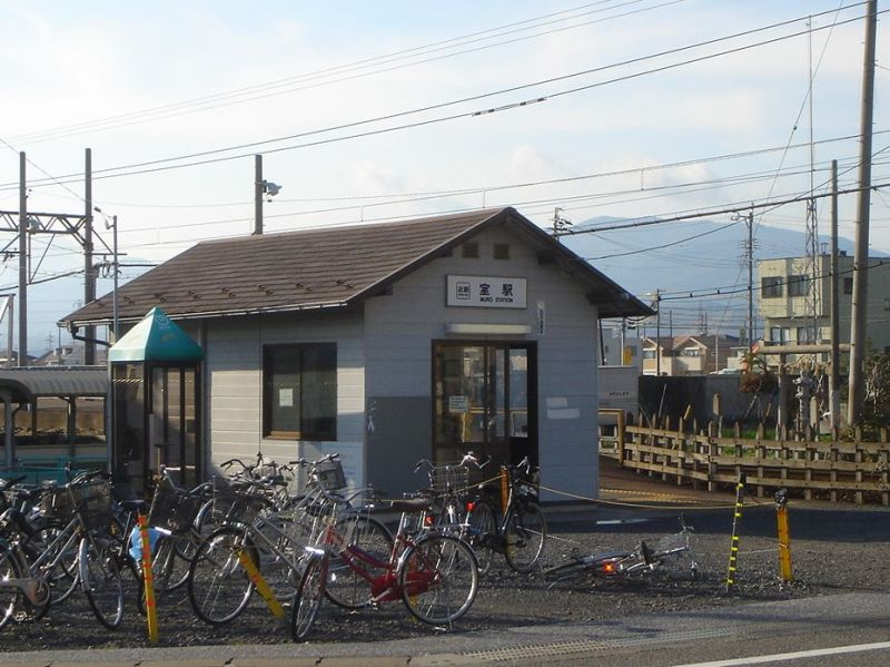 近鉄時代の養老線室駅(岐阜県大垣市)